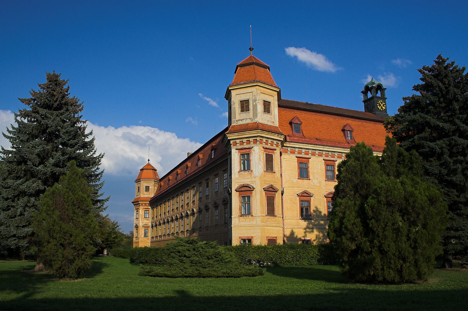 Holešovský zámek